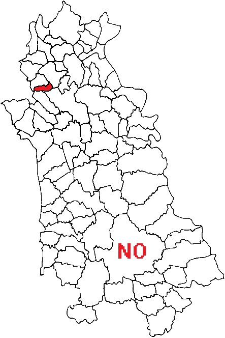 Mappa con posizione del comune nella provincia italiana di Novara